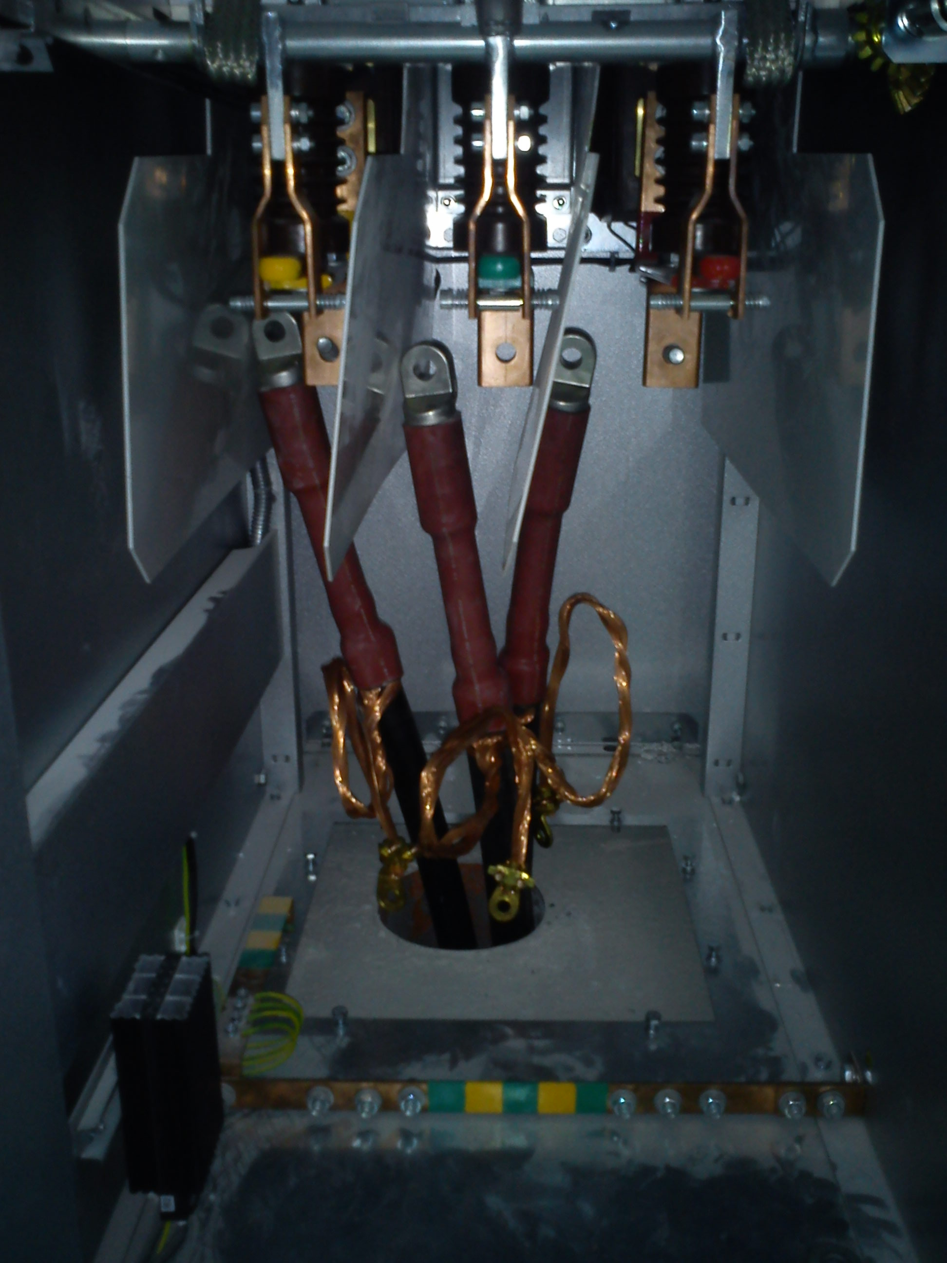 Підключення силового кабелю 10 кВ в комірці РП-10кВ (нижнє підключення)